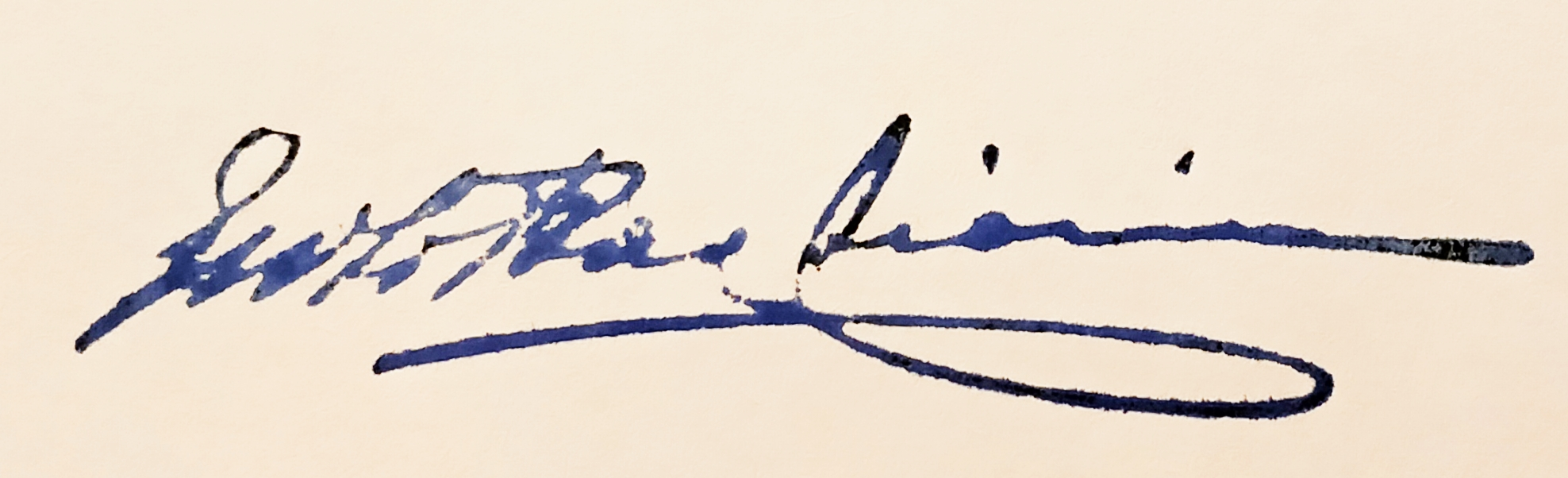 Firma di Enzo Baglioni incisore e pittore italiano